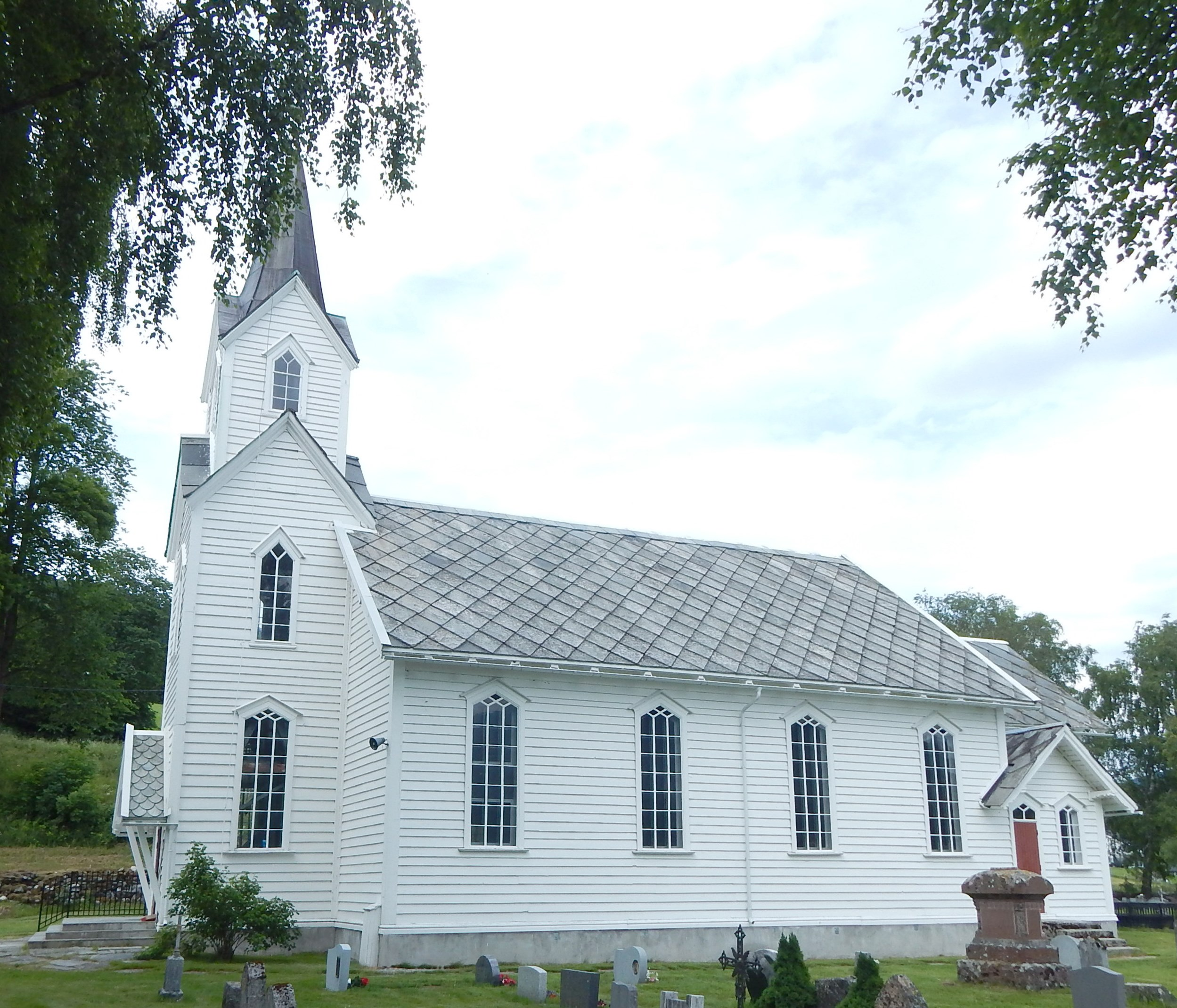 Hafslo kirke i Luster